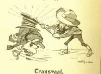 Karikatur in der Satirezeitschrift "Scherer" zum Burenkrieg